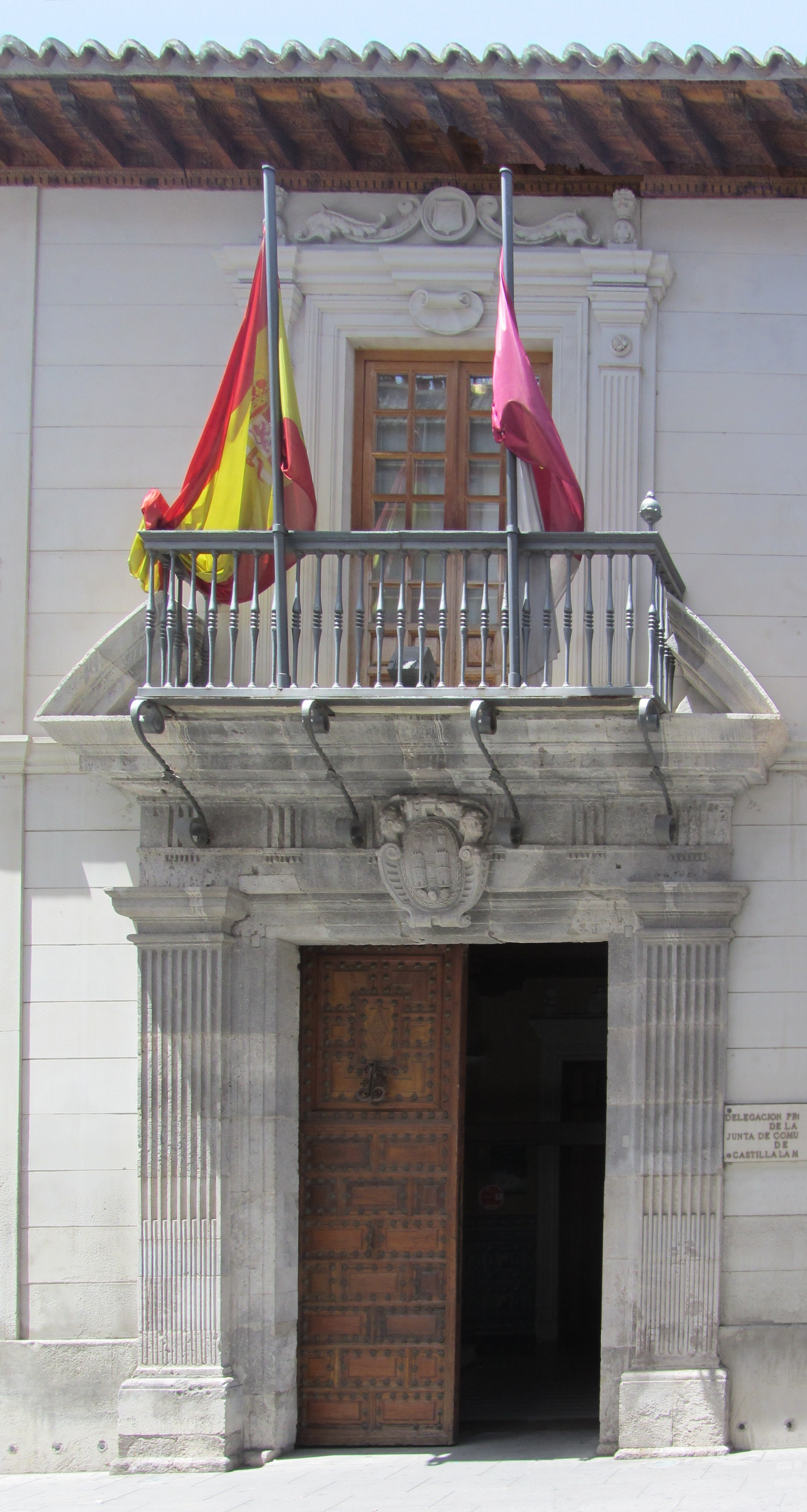 Pórtico del Palacio de Medrano situado en la calle Paloma, nº 9, en Ciudad Real (España). Edificio de estilo neorrenacentista, levantado en el siglo XIX sobre el palacio del Marqués de Treviño. También conocido como «casa de las cabezas», por las tres cabezas de moro del escudo nobiliario de los Treviño, que destaca en su portada del siglo XVI. Tiene un elegante patio columnado. Hoy acoge la Delegación de la Junta de Comunidades de Castilla-La Mancha.